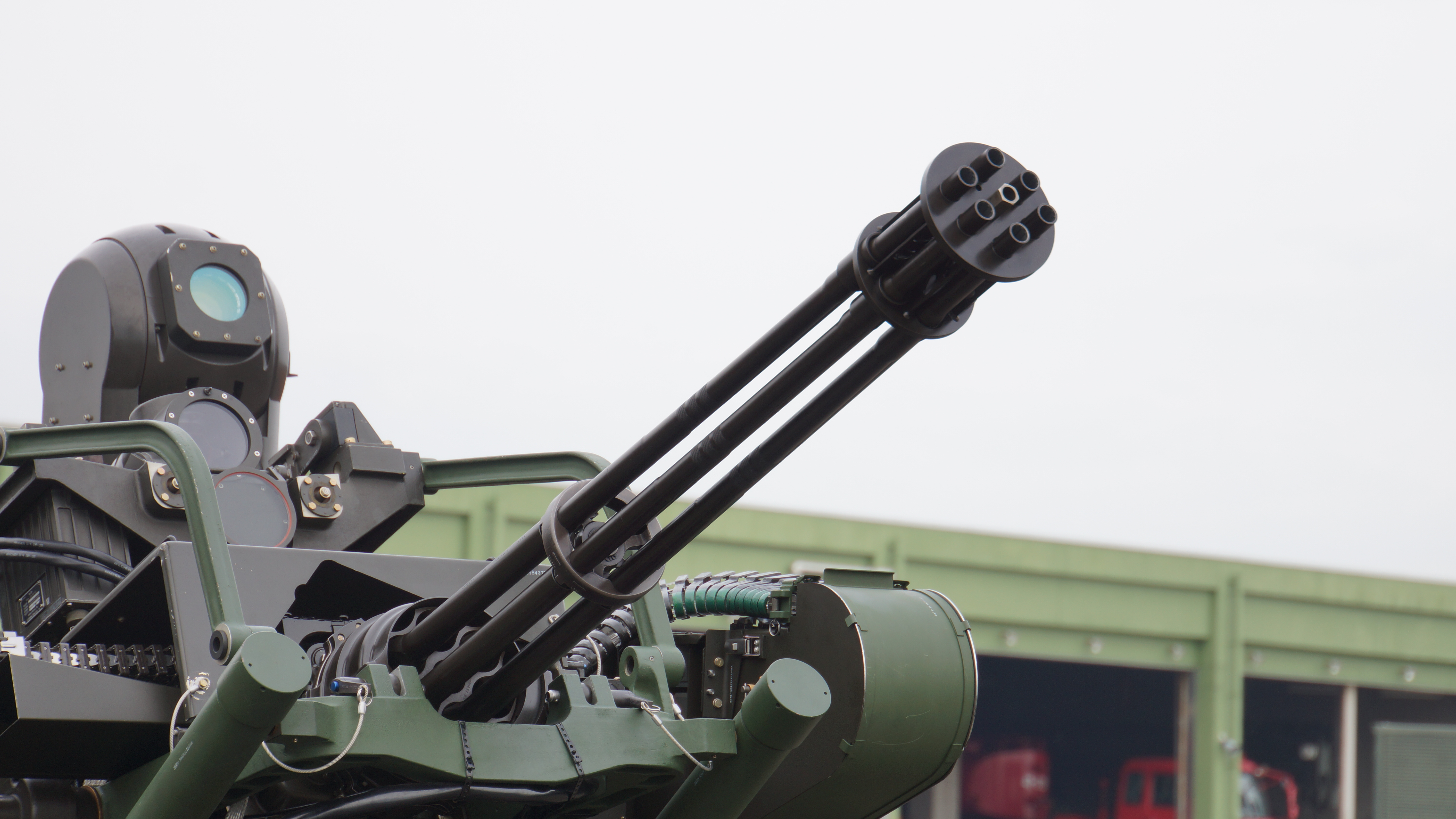 航空自衛隊 20mm対空機関砲VADS-1改（JM167A1） 銃身 右前面。2017年11月26日 築城基地にて。